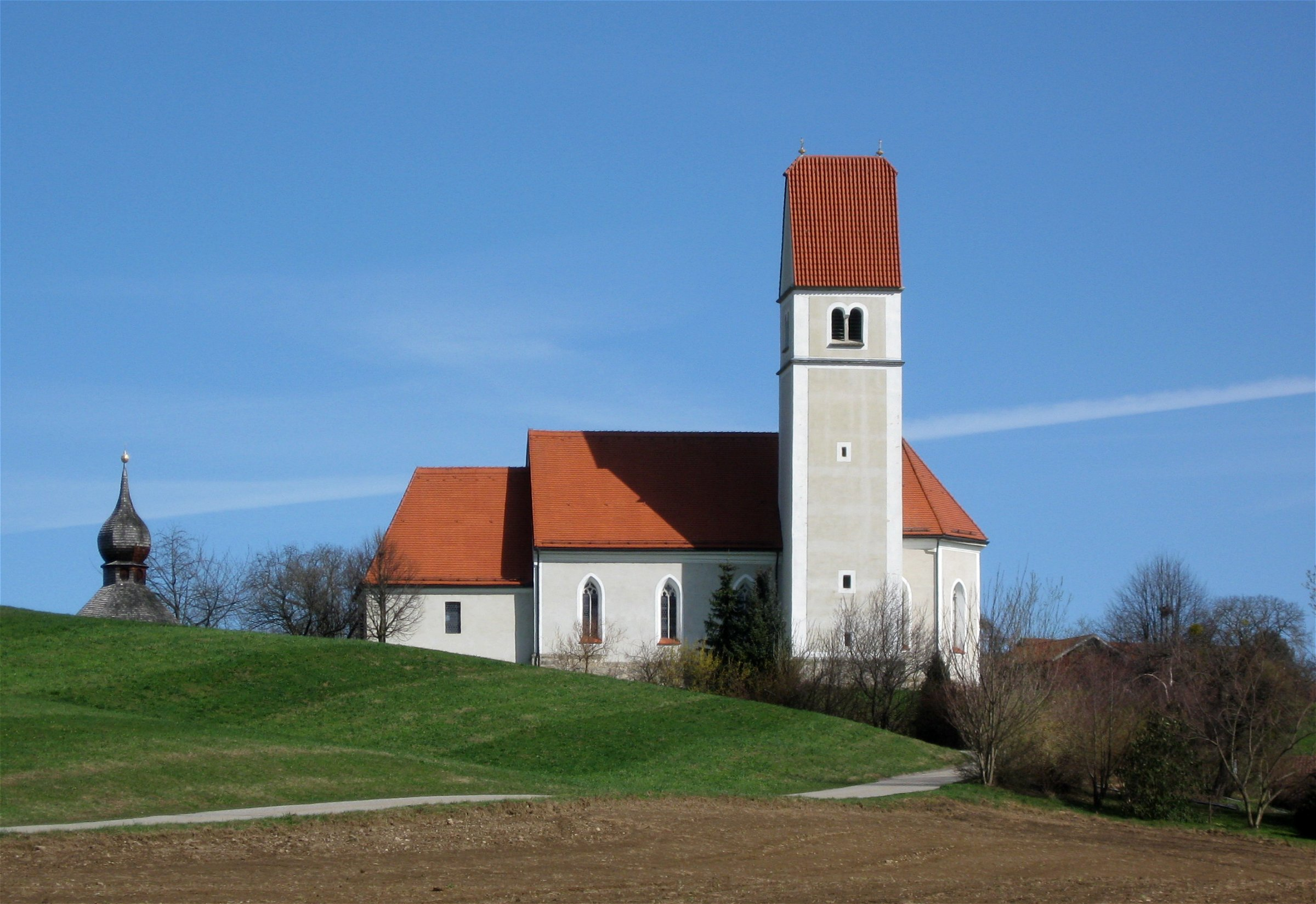 Wallfahrtskirche St. Florian, Frasdorf